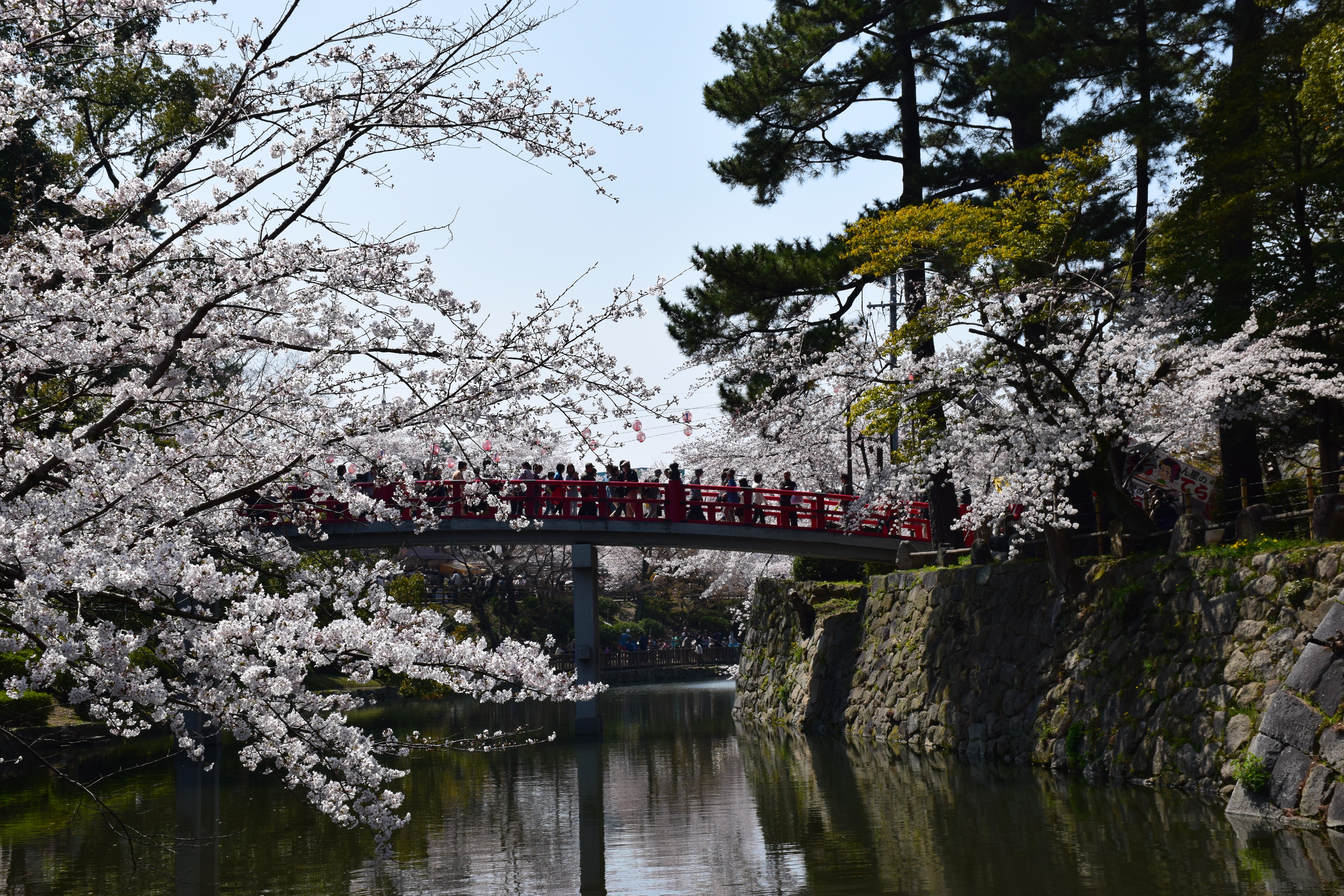 岡崎桜まつり